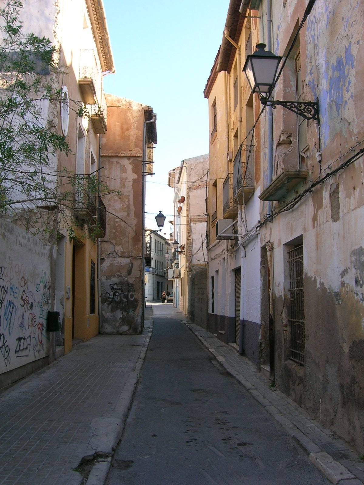 La Purisima, Elda. Deterioro